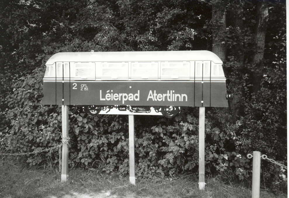 Schild an der luxemburgischen Attertlinie (In Eischen)